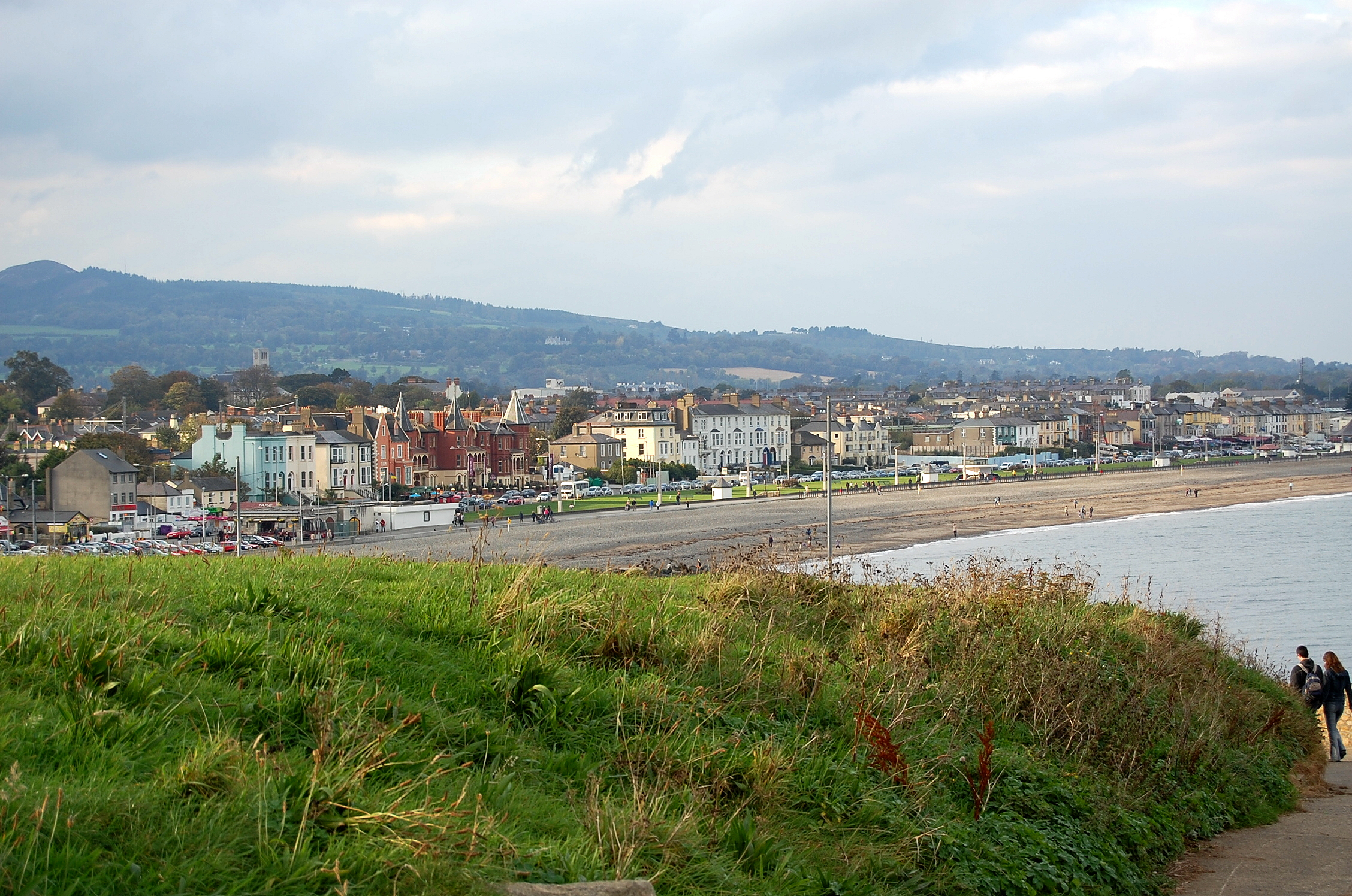 Der Ort Bray